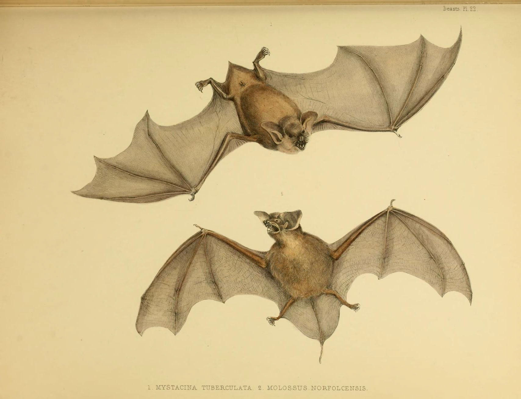 Mystacina tuberculata, "Molossus norfolcensis" =Mormopterus norfolkensis